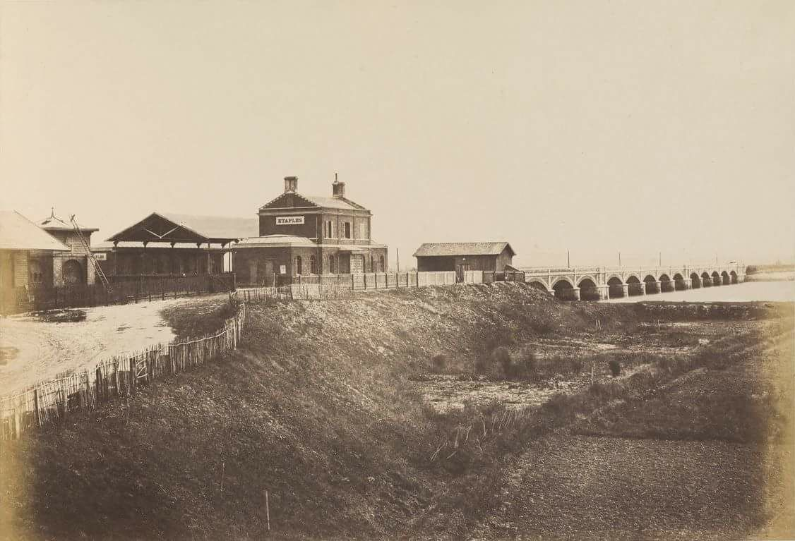 Ancienne gare d'Étaples, proche du pont traversant la Canche.